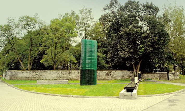 Park ušľachtilých duší (2010)